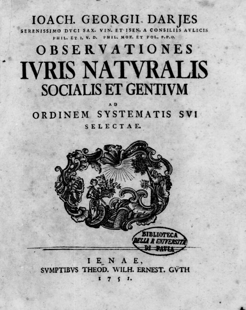 Frontespizio